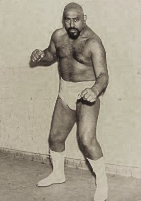 luchador profesional nacido en Perú